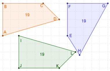 Складни и нескладни четириаголници